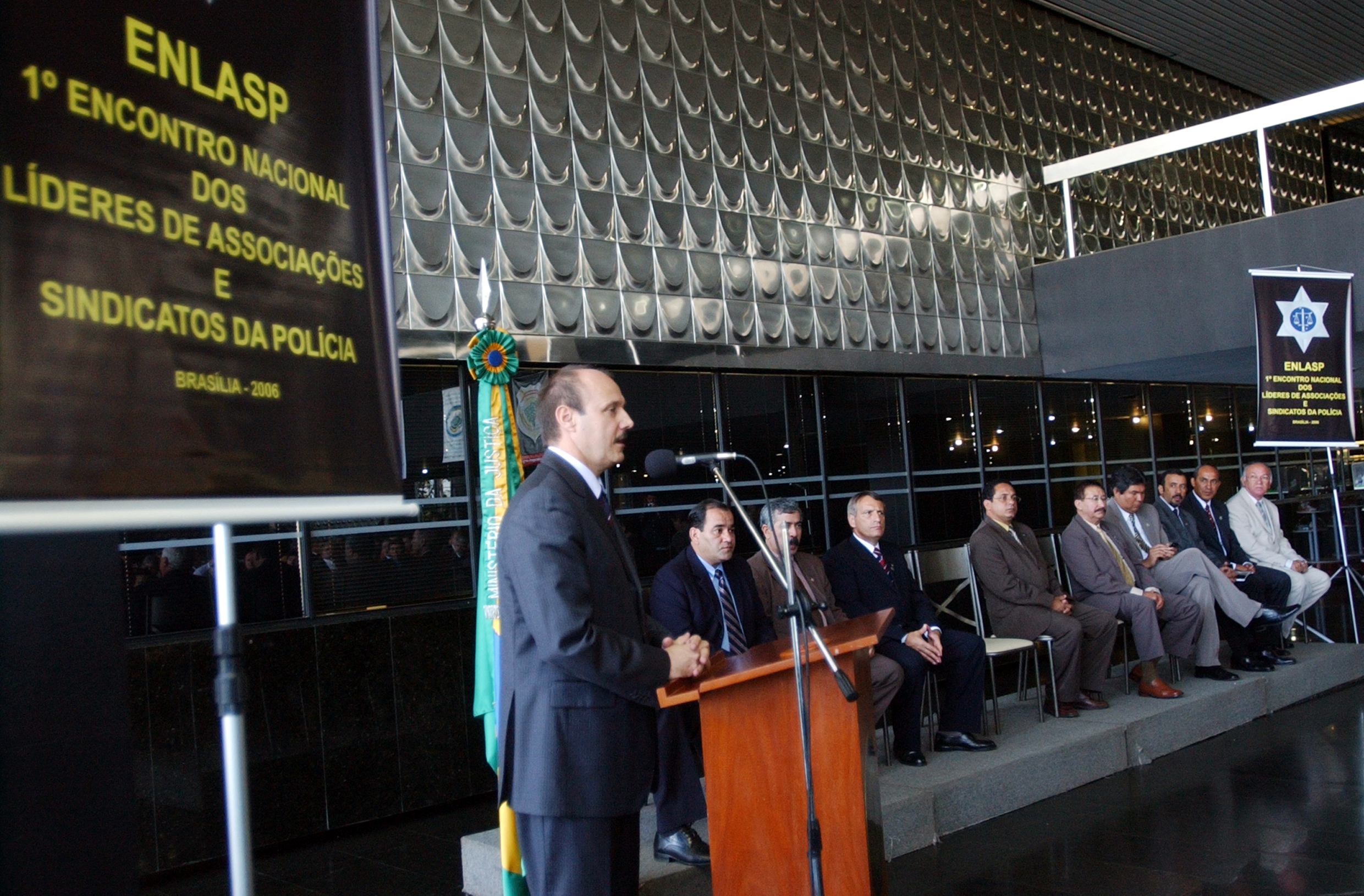 Brasília - Secretário Nacional de Segurança, Luiz Fernando Corrêa, participa do 1º Encontro Nacional dos Líderes de Associações e Sindicatos da Polícia.